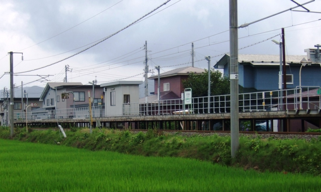 Kita-Ōmagari Station, on the Tazawako Line, Daisen, Akita, Japan